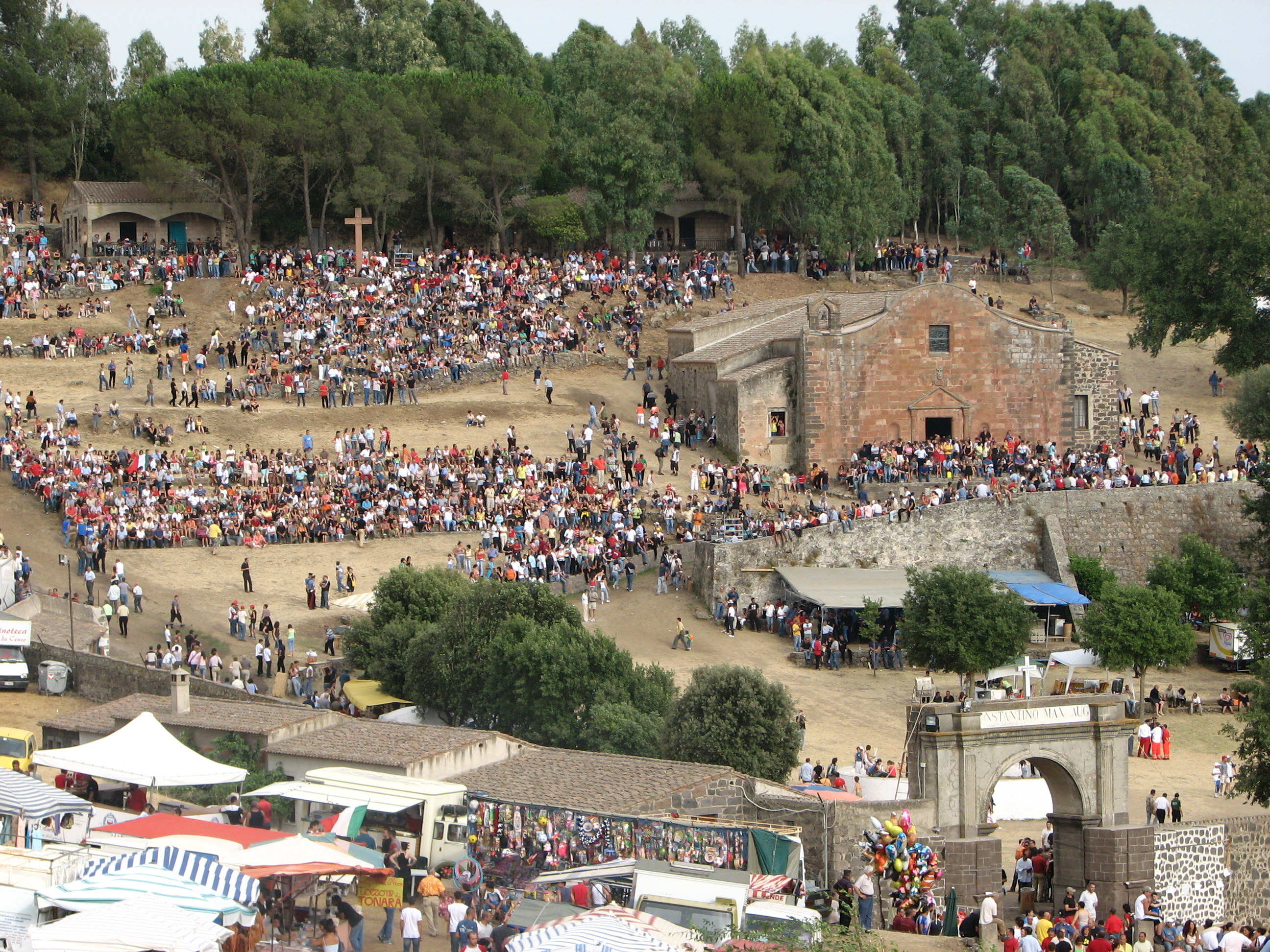 Foto del santuario di San Costantino il giorno del 6 luglio 2006